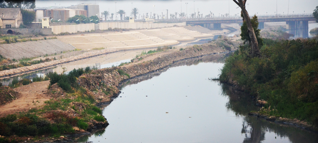 L'Oued El Harrach à moins d'1 km de son embouchure